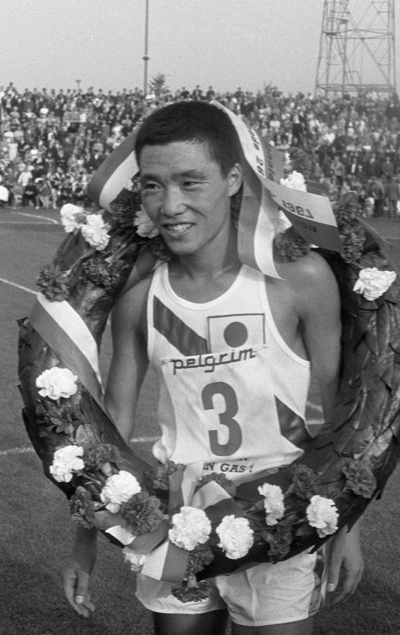 Elfde Internationale Marathon Enschede. Yoshiro Mifune met krans